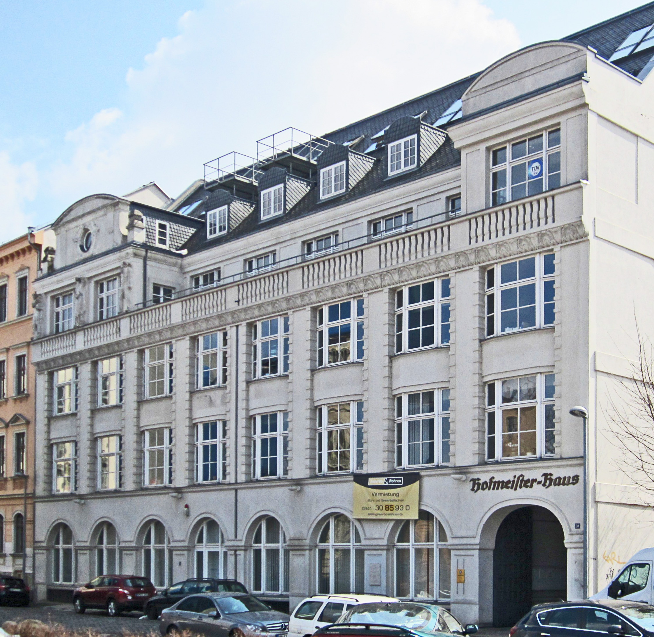 Leipzig, Büttnerstraße Nr. 10 (Hofmeister-Haus): Geschäftshaus in ehemals geschlossener Bebauung mit Hofflügel und Tordurchfahrt (Putzfassade); Gründungsort des Deutschen Fußball-Bundes am 28.01.1900